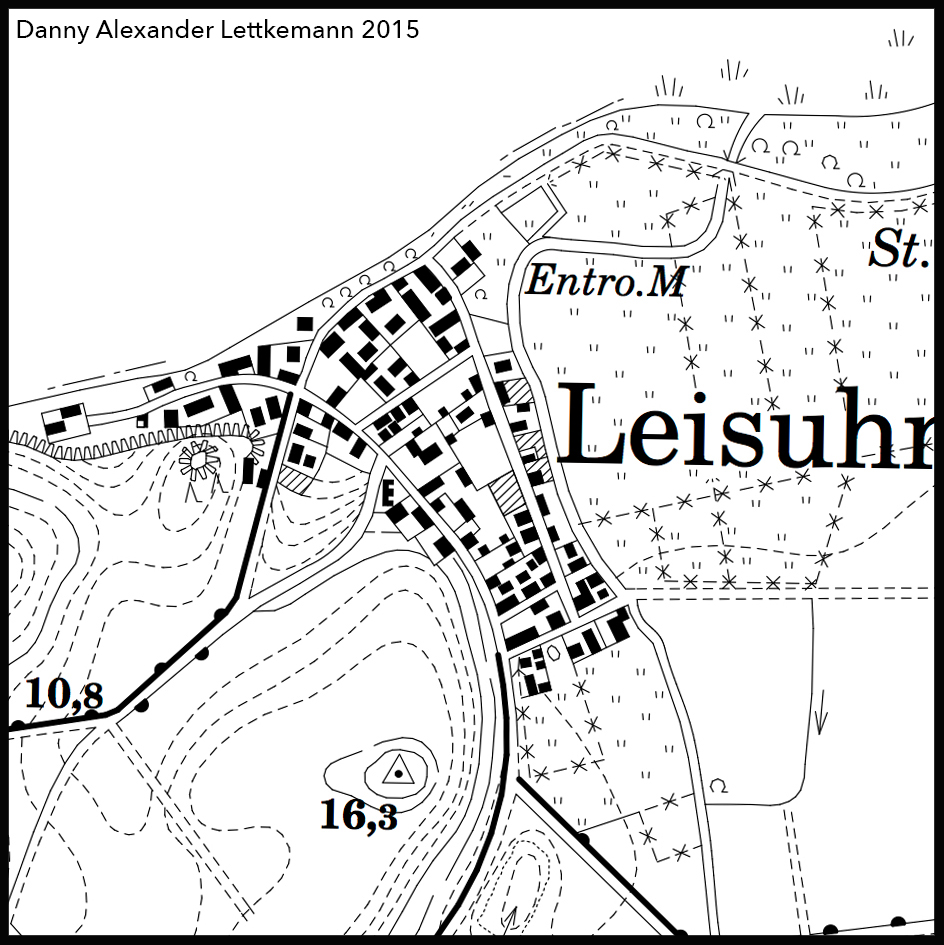 Karte von Leisuhnen vor 1939 Leysuhnen, Heute Schtschukino.